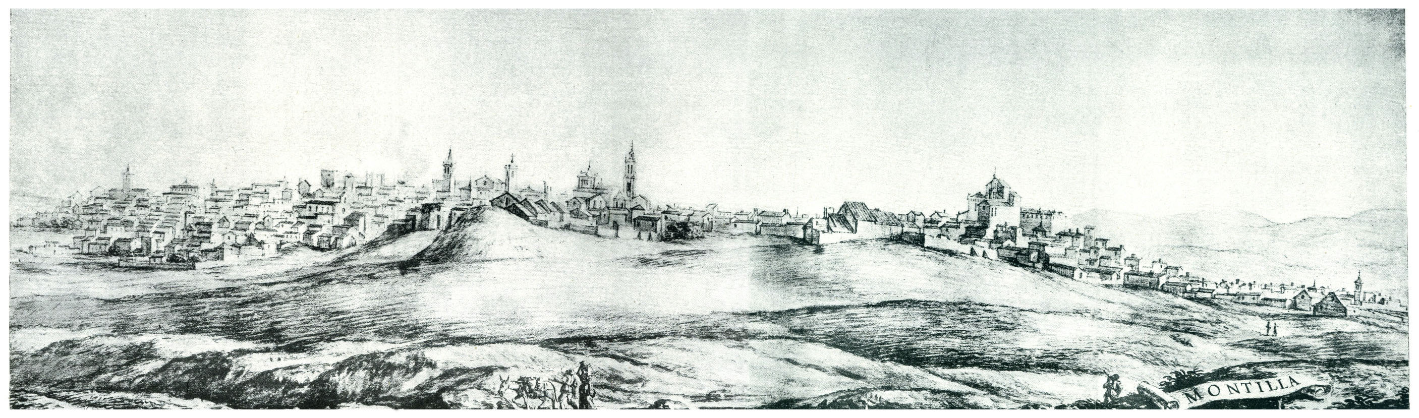 Acuarela de la ciudad de Montilla (Córdoba) en 1668, pintada por Pier Maria Baldi